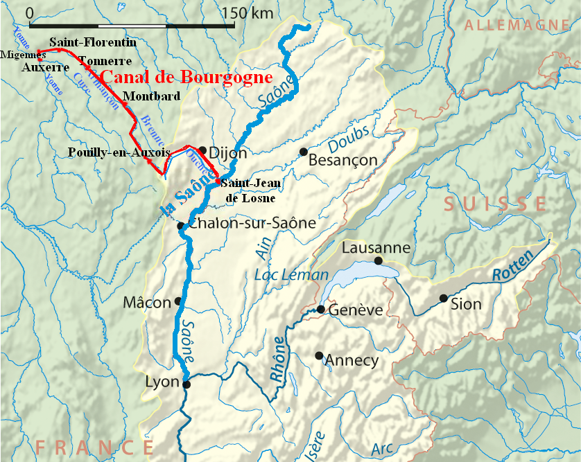 Surlignage du tracé du Canal de Bourgogne entre la Seine et la Saône - France. Adapté de Image:Rhone bassin versant.png réalisé par User:NordNordWest en mars 2008.